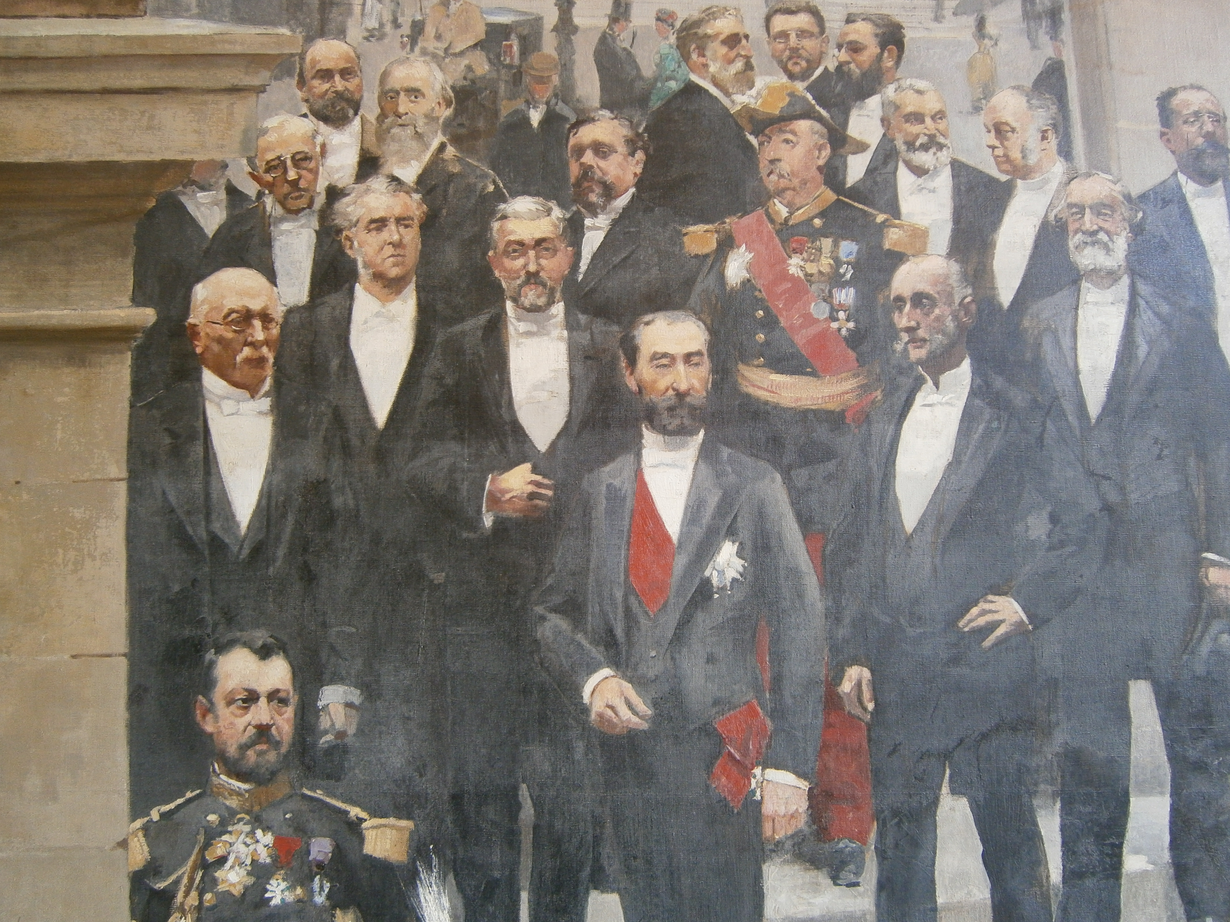 Détail d'un tableau consistant en un fragment du panorama intitulé L'Histoire du siècle (20 m de haut, 120 m de long) réalisé par Henri Gervex et Alfred Stevens (1889).